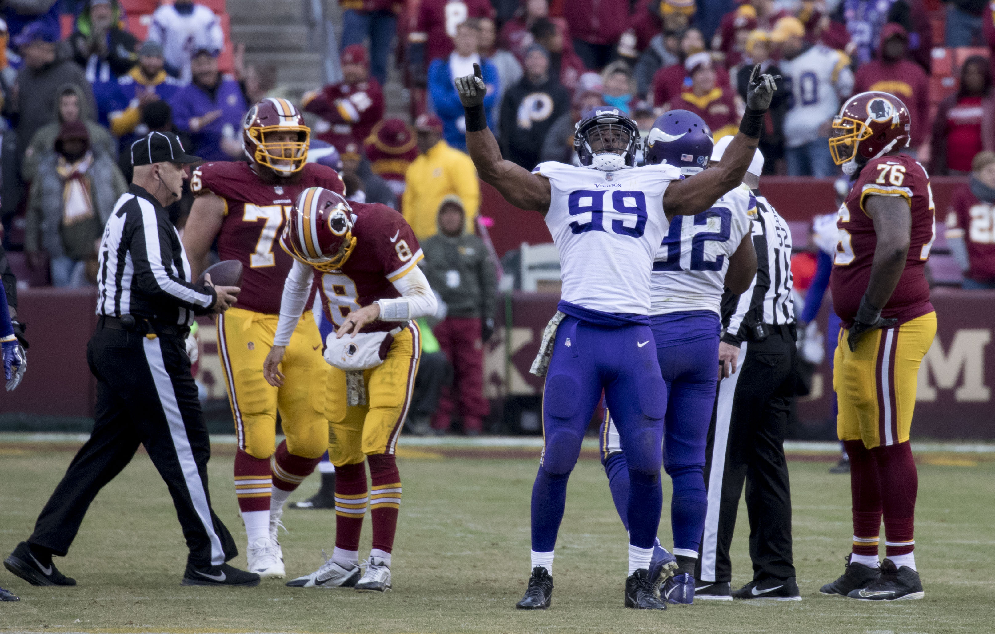 Vikings at Redskins 11/12/17